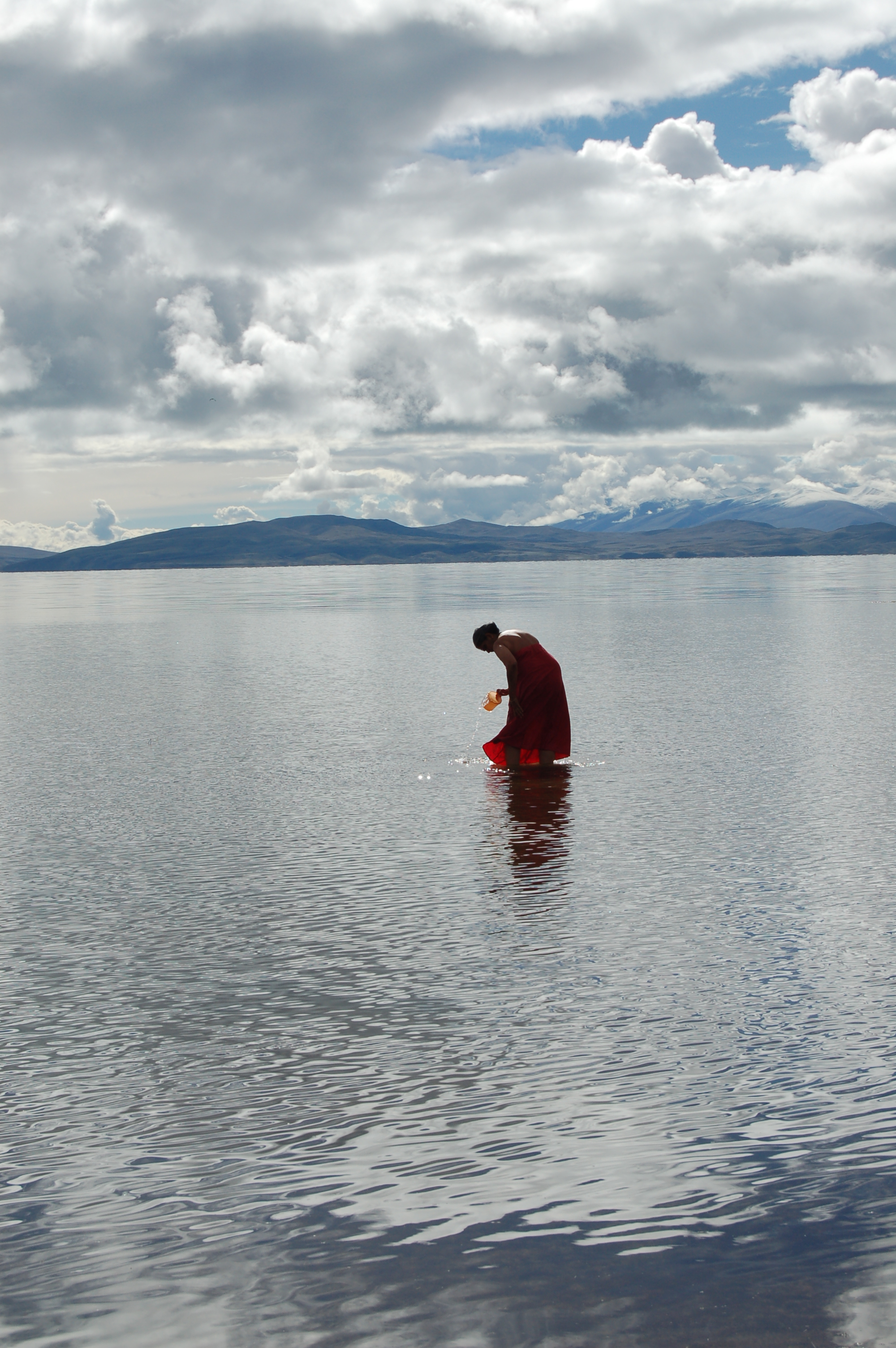 Indische Pilgerin badet im Manasarowar See.